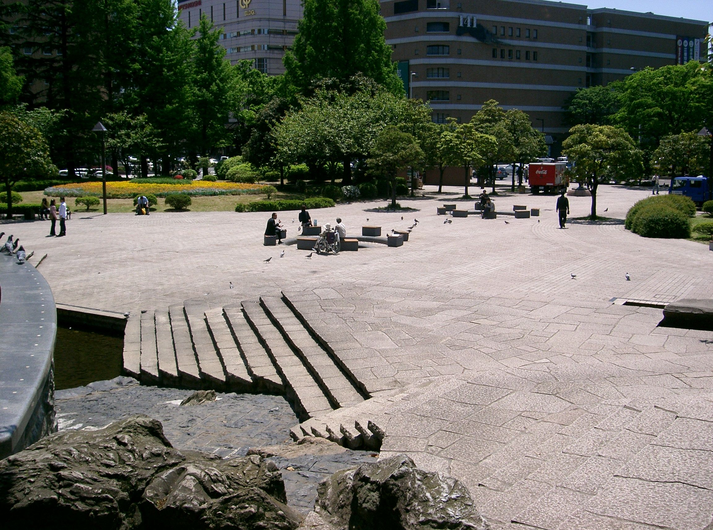 勾当台公園